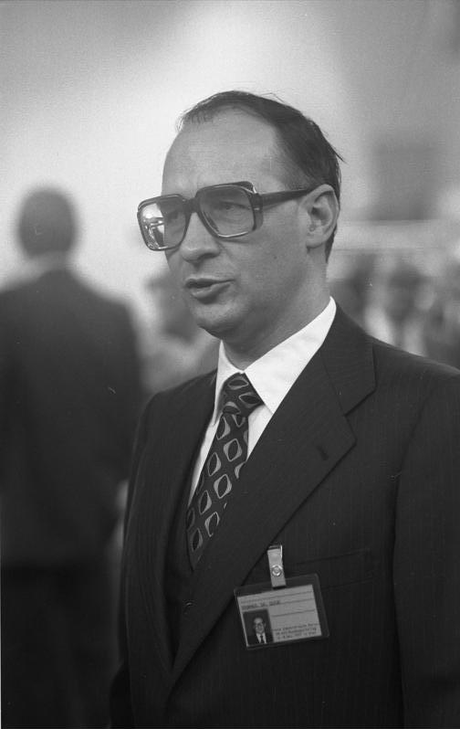 28. Ordentlicher Bundesparteitag der FDP in der Kieler Ostseehalle (Guido Brunner) 6.-8.11.1977